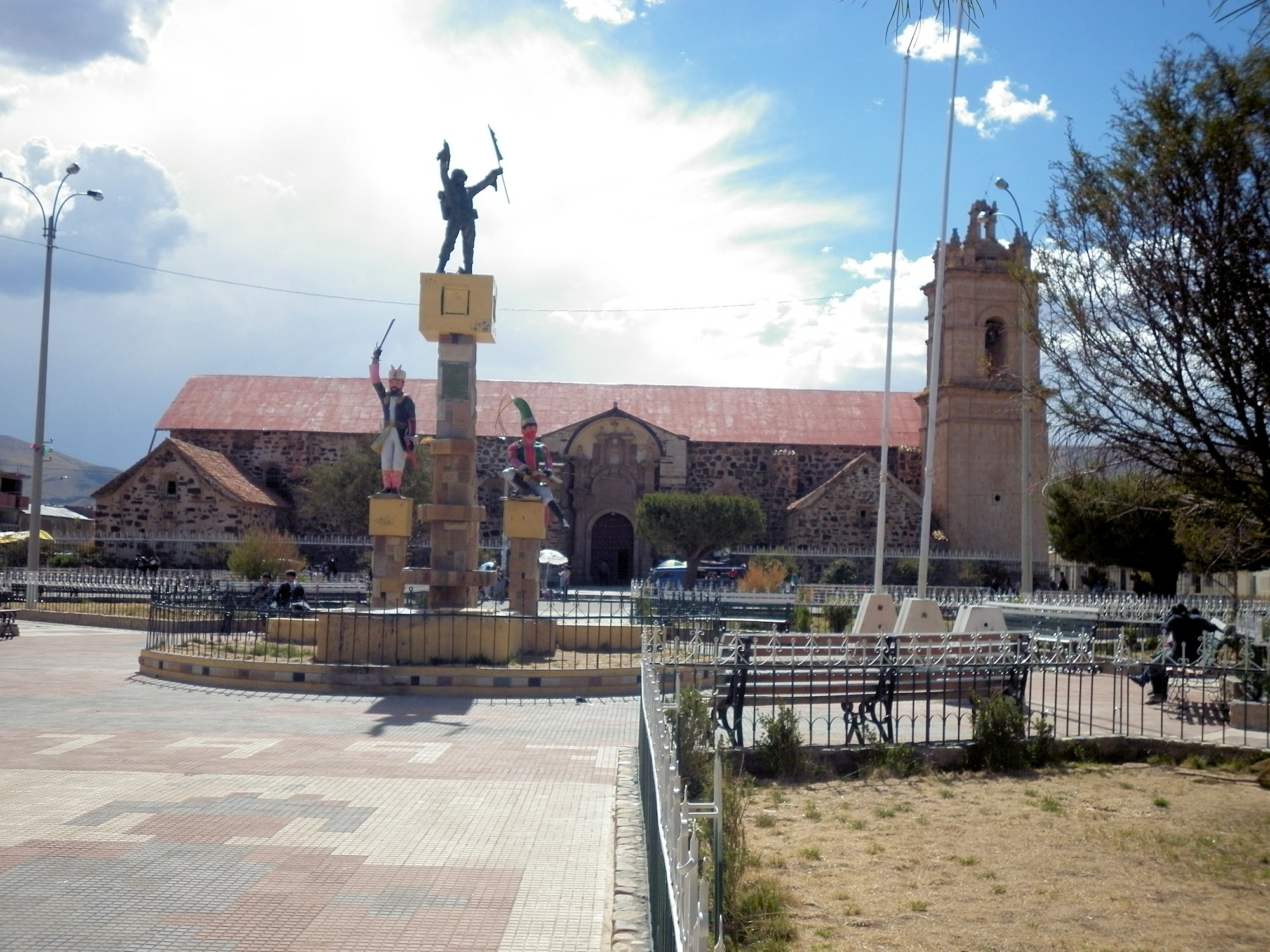 Plaza principal Cabanilla, de fondo la Catedral.